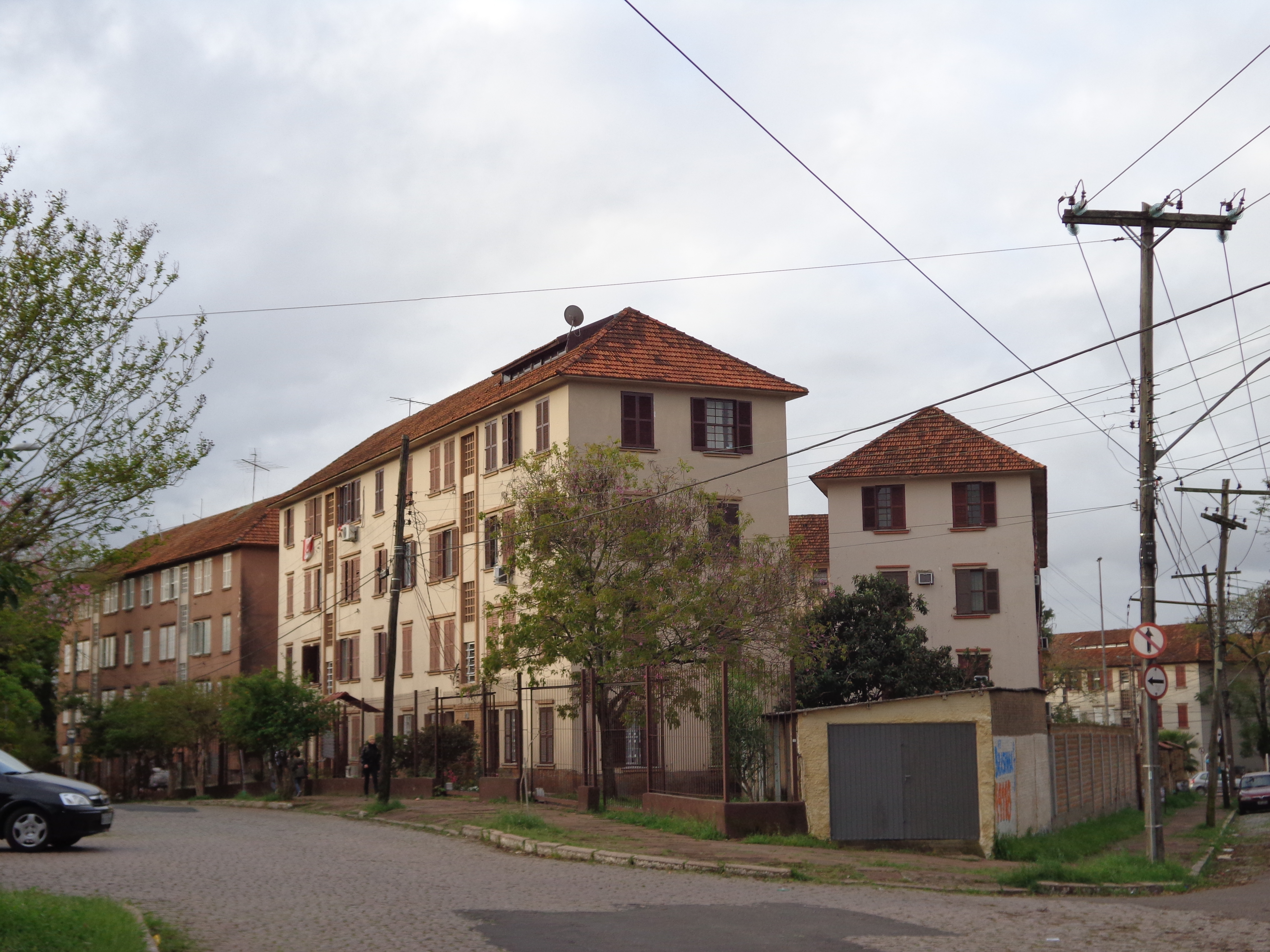 Blocos residenciais da Vila do IAPI, em Porto Alegre, RS.